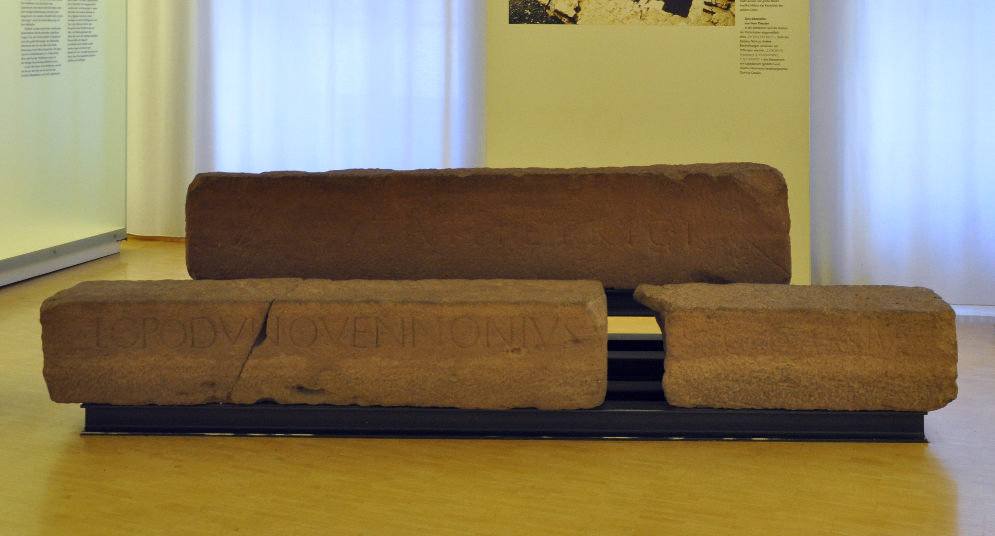 Konstanz, Archäologisches Landesmuseum Baden-Württemberg, Stufen aus dem römischen Theater von Ladenburg. In die Sitzfkächen eingeritzt die Namen der Platzinhaber, z. B. Optati Tetrici ([Stufe des] Optatus Tetricus); andere Beschriftungen verweisen auf Stiftungen LOPODVN[ensibus] Q. VENNONIVS, ... S. Q. CASSIUS (den Lopodunensern gestiftet von Quintus Vennonius ... Quintus Cassius).